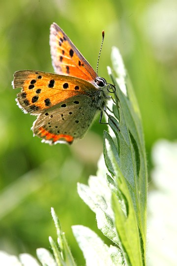 Lycaena phlaeas (ベニシジミ)